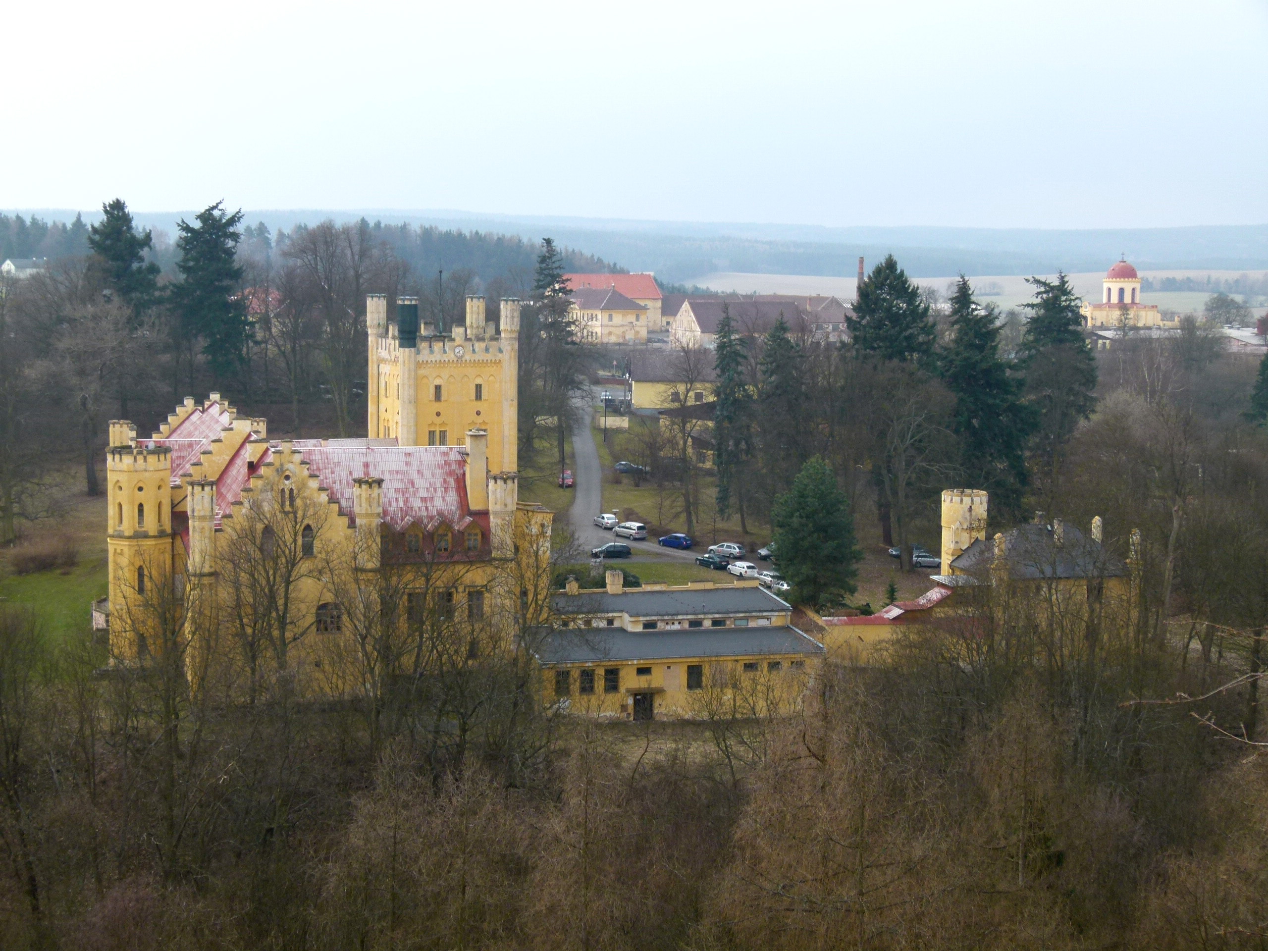 Zámek Hrad Nečtiny, Hrad Nečtiny